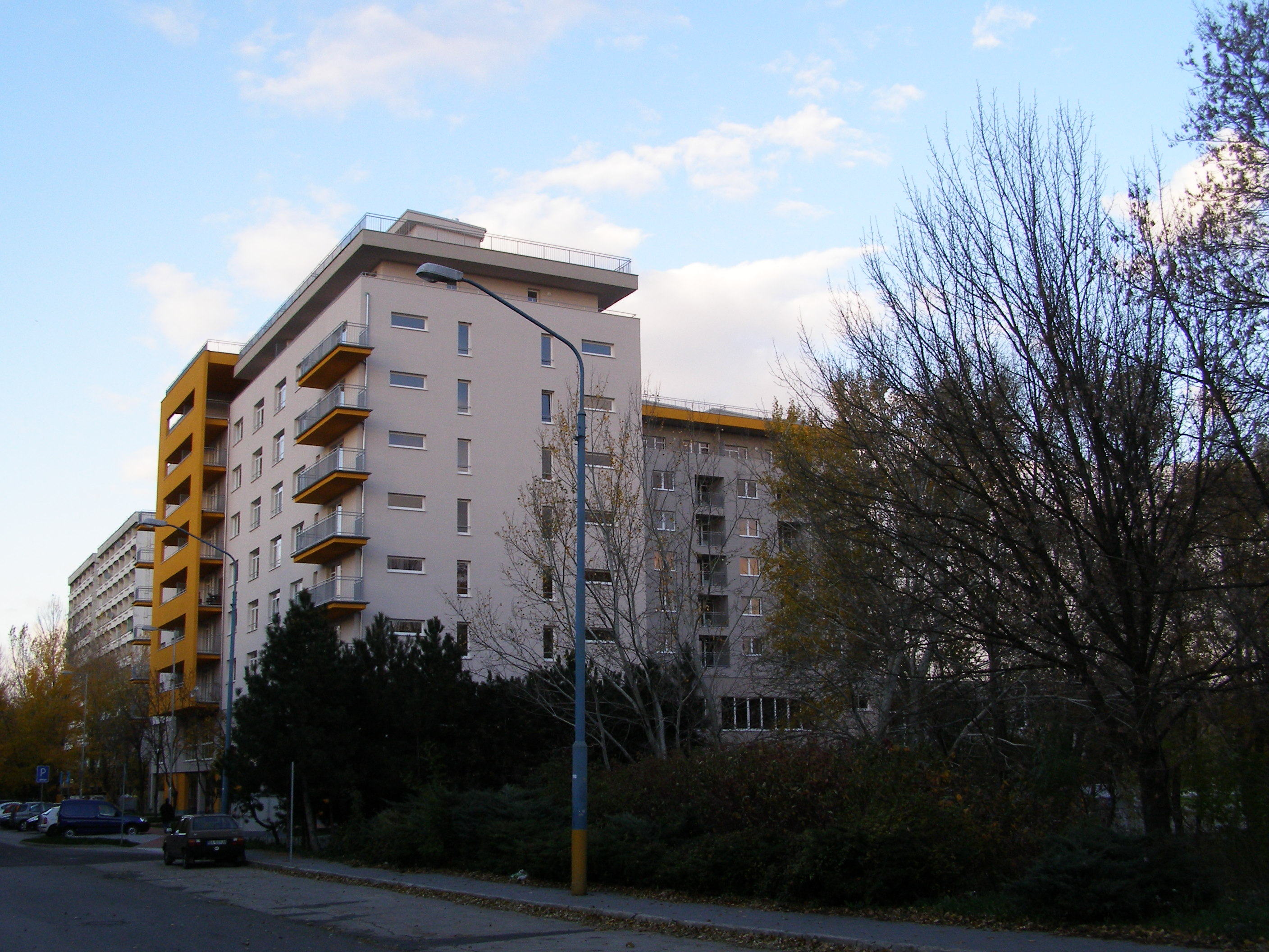 Antolská street, Petržalka, Bratislava, Slovakia